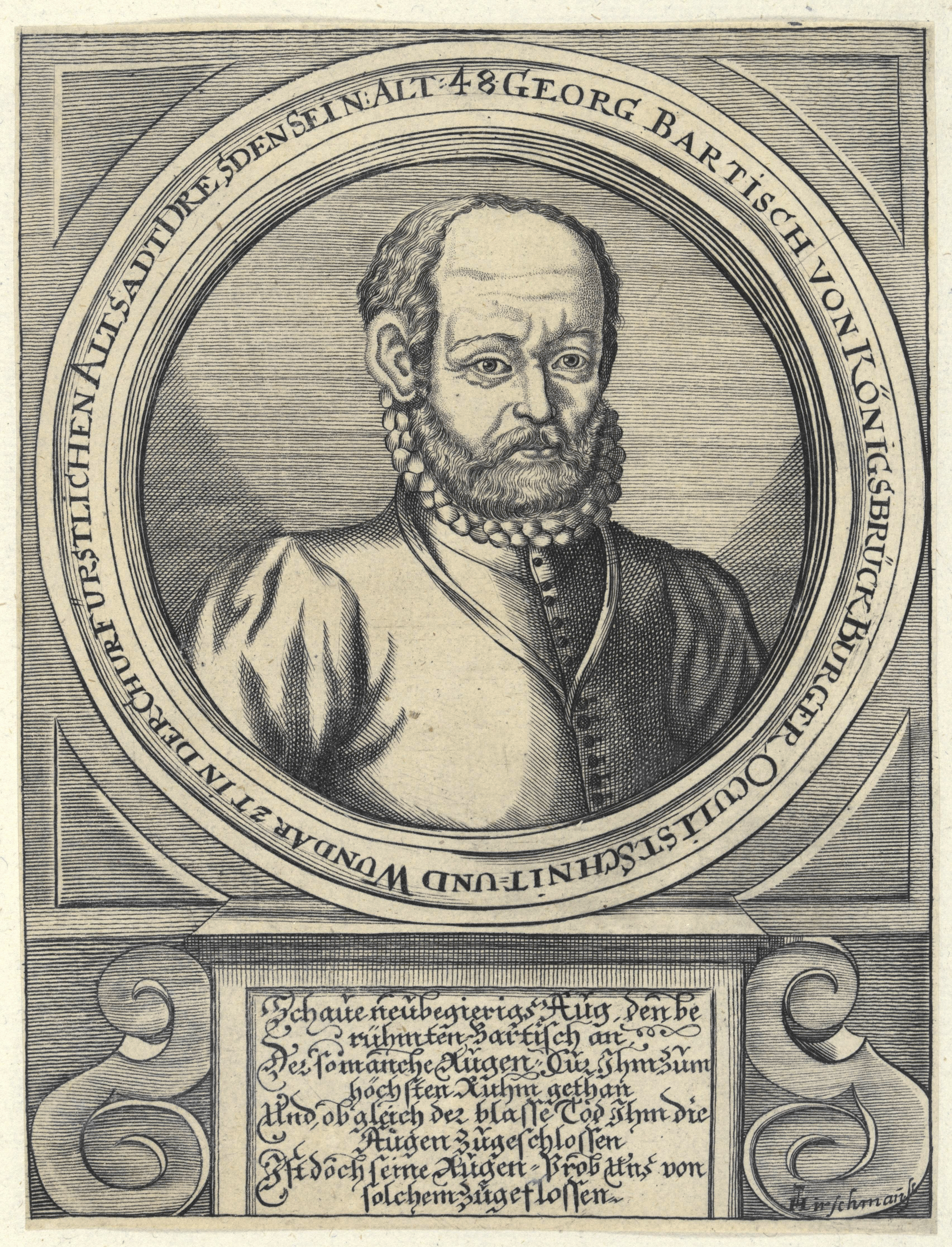 Bildnis des Georg Bartisch Kupferstich und Radierung, 179 x 135 mm (Blatt) Nürnberg, Germanisches Nationalmuseum, Graphische Sammlung (Paul Wolfgang Merkel'sche Familienstiftung), Inventar-Nr. MP 1533, Kapsel-Nr. 22